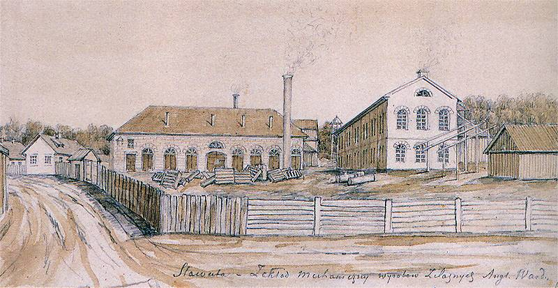 SŁAWUTA. Fabryka wyrobów żelaznych. Widok od strony drogi zespołu budynków fabrycznych. Napis: Sławuta - Zakład mechaniczny wyrobów Żelaznych Angl. Ward.; napis na podkładzie: Sławuta, - fabr. wyr. żelaznych Wołyń. 1874. Rys. ołówkiem podmalowany sepią. 20,5 x 29,5 cm. Muzem Narodowe, Kraków. III-r.a. 4256 (Teka Wołyń).